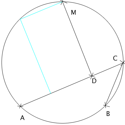 阿基米德中点定理